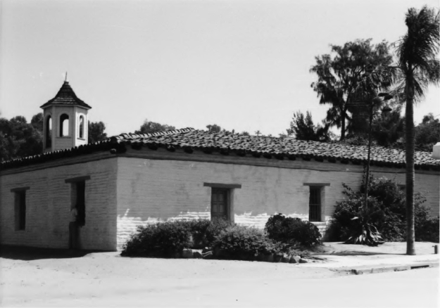 Casa de Estudillo, after its 1968 restoration